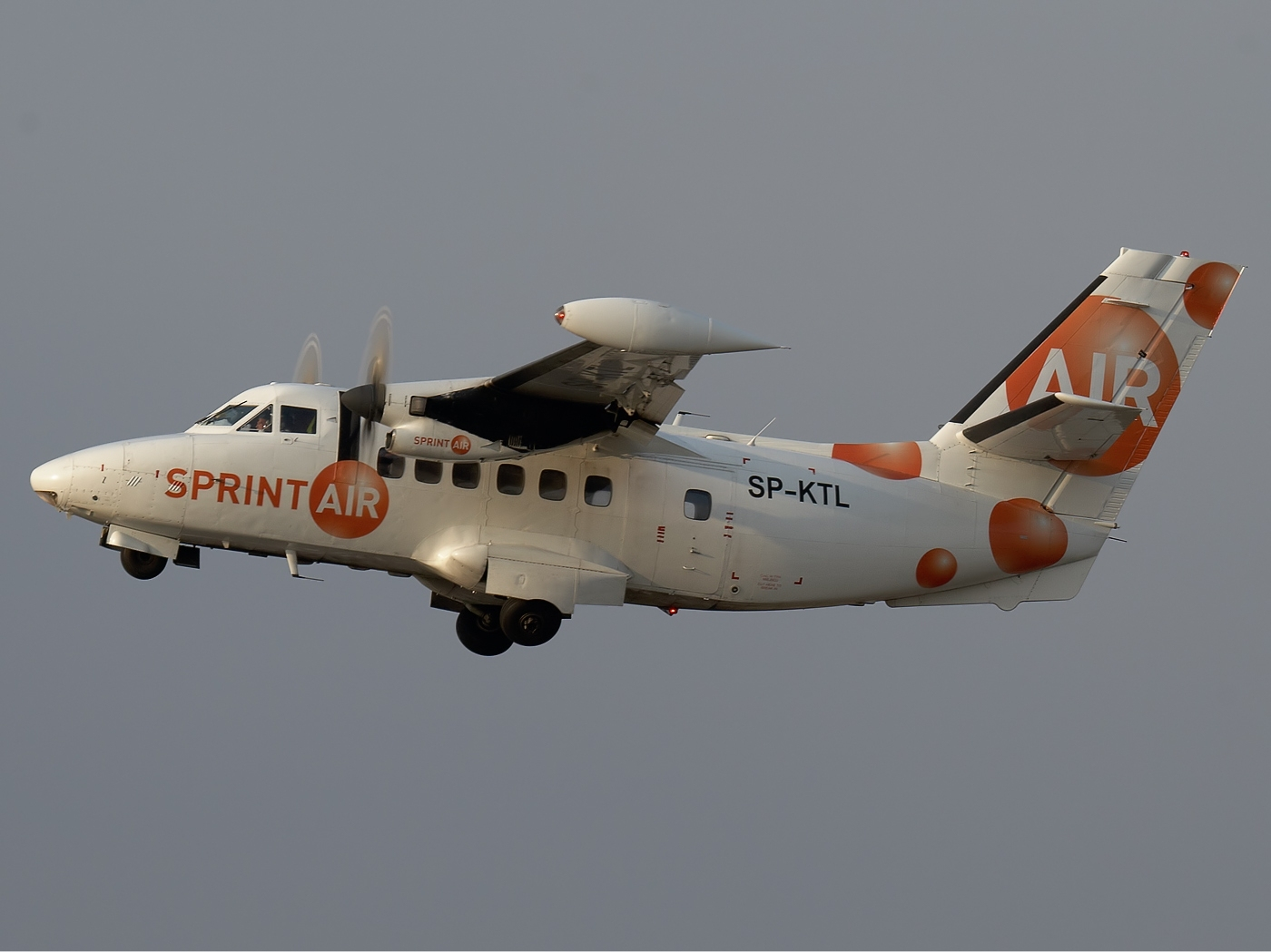 Sprint Air Let L-410UVP-3